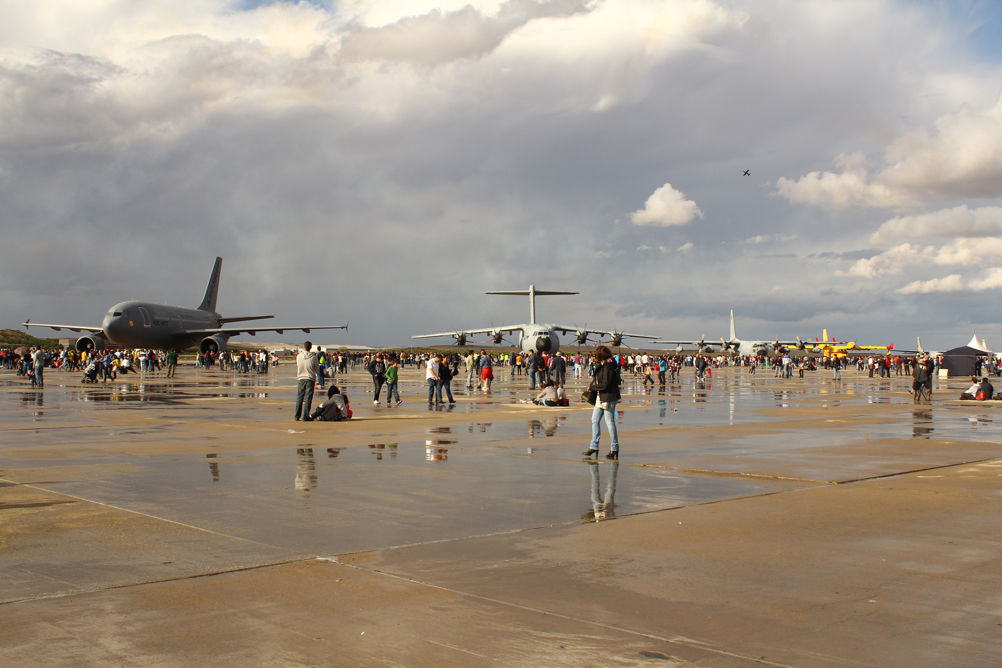 Festival Aéreo Internacional Aire75, celebrado el 11 de octubre de 2014 en la Base Aérea de Torrejón de Ardoz, Madrid, con motivo del 75º aniversario del Ejército del Aire de España. Aire75 International Airshow, held on October 11, 2014 at the Torrejón de Ardoz Air Base, Madrid, to celebrare the 75th anniversary of the Spanish Air Force.